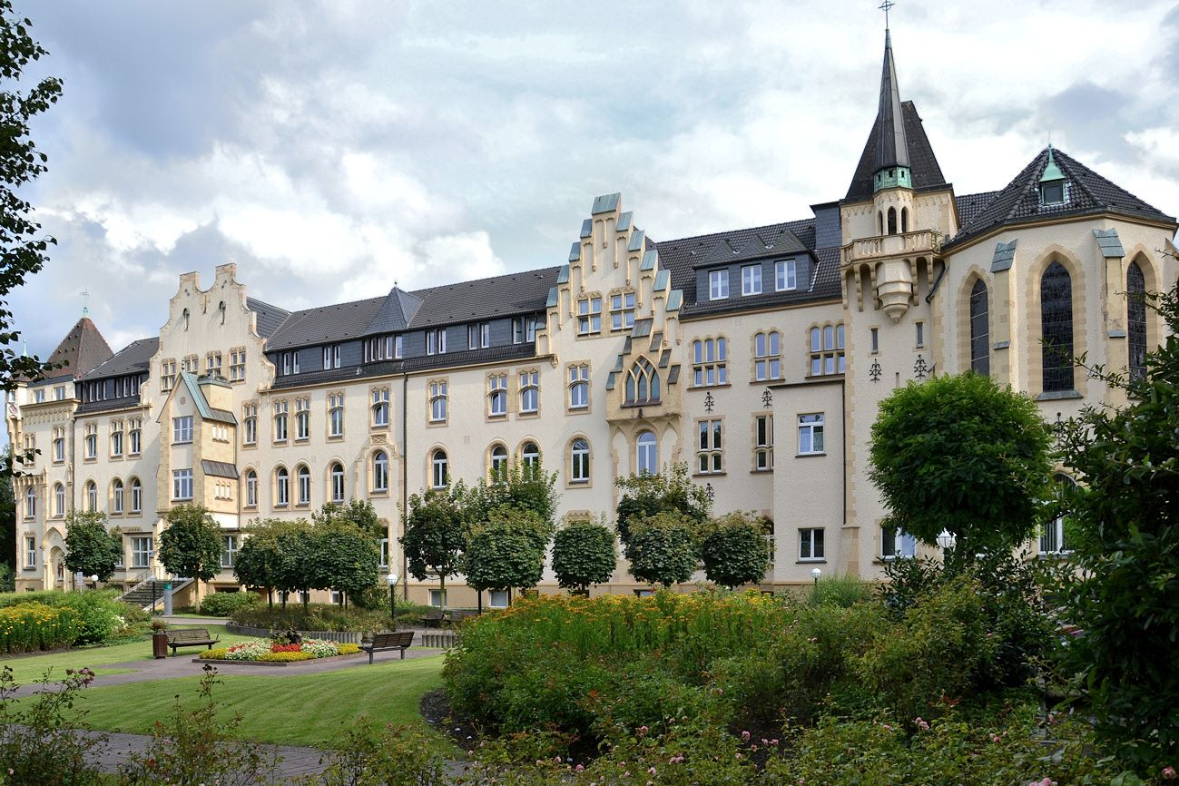 Laurentius Seniorenwohnheim in Essen-Steele, ehem. Laurentius-Hospital